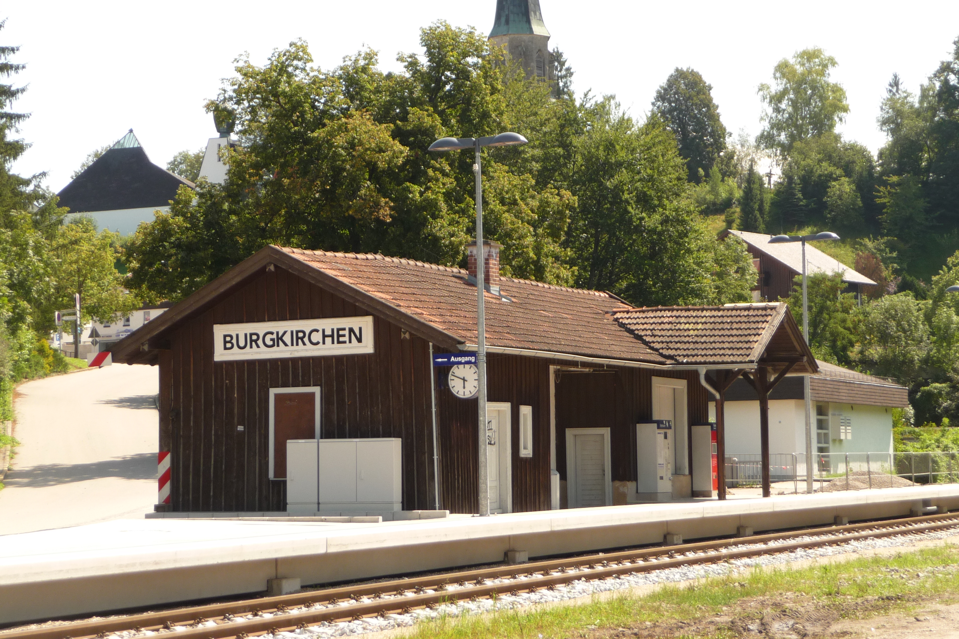 Der Haltepunkt Burgkirchen an der Alz